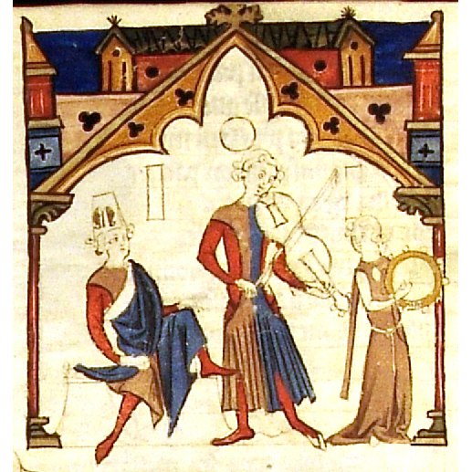 Nobre, jogral com viola de arco, rapariga com pandeiro redondo e de soalhas exteriores. Note-se que a personagem sentada tem um chapéu, no qual parece desenhar-se a letra M (é esta, de resto, a única personagem com chapéu de todas as iluminuras).